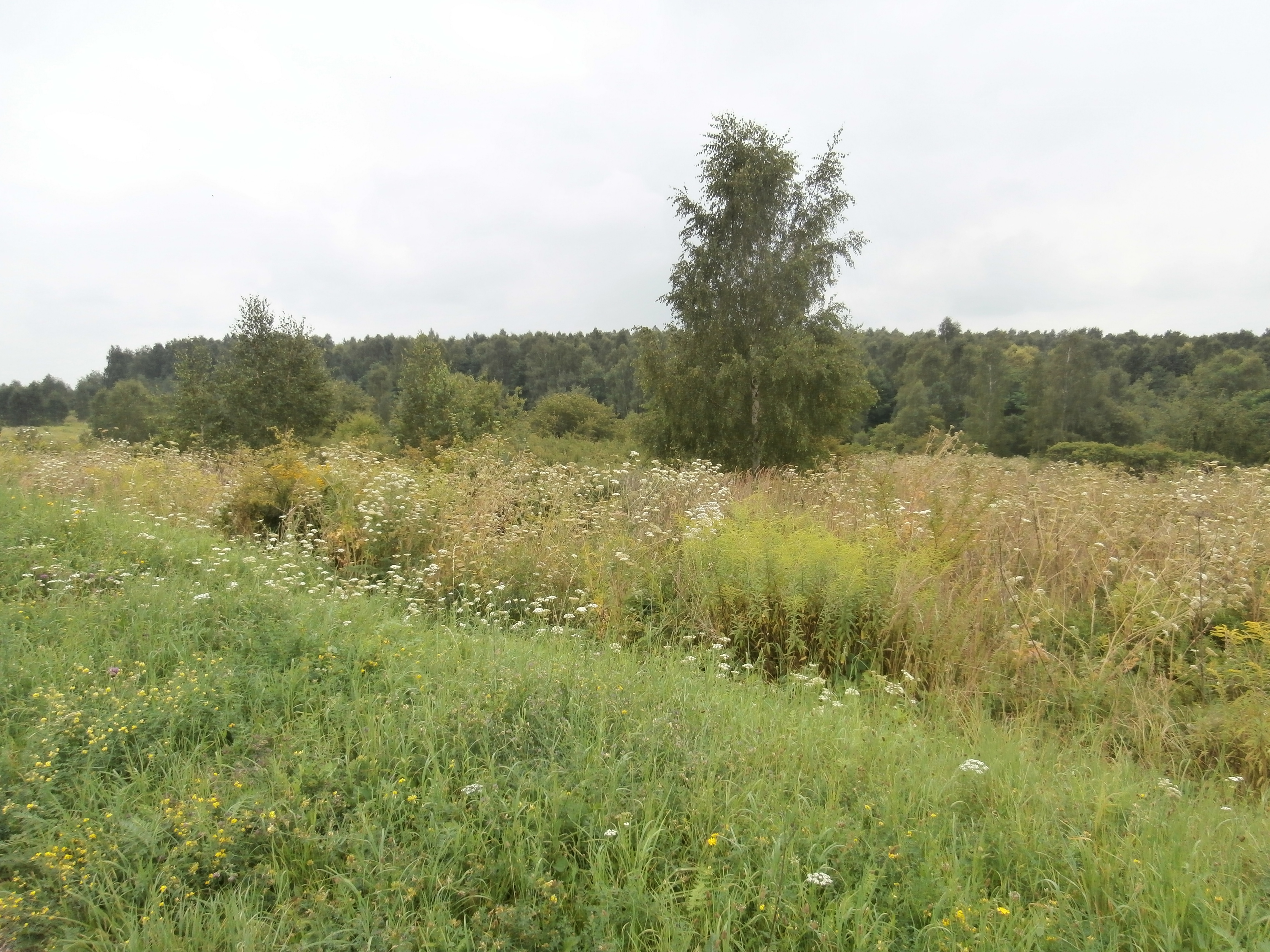 Warpie po kopalni galmanu "Kawia Góra" w Strzemieszycach Małych (Dąbrowa Górnicza)